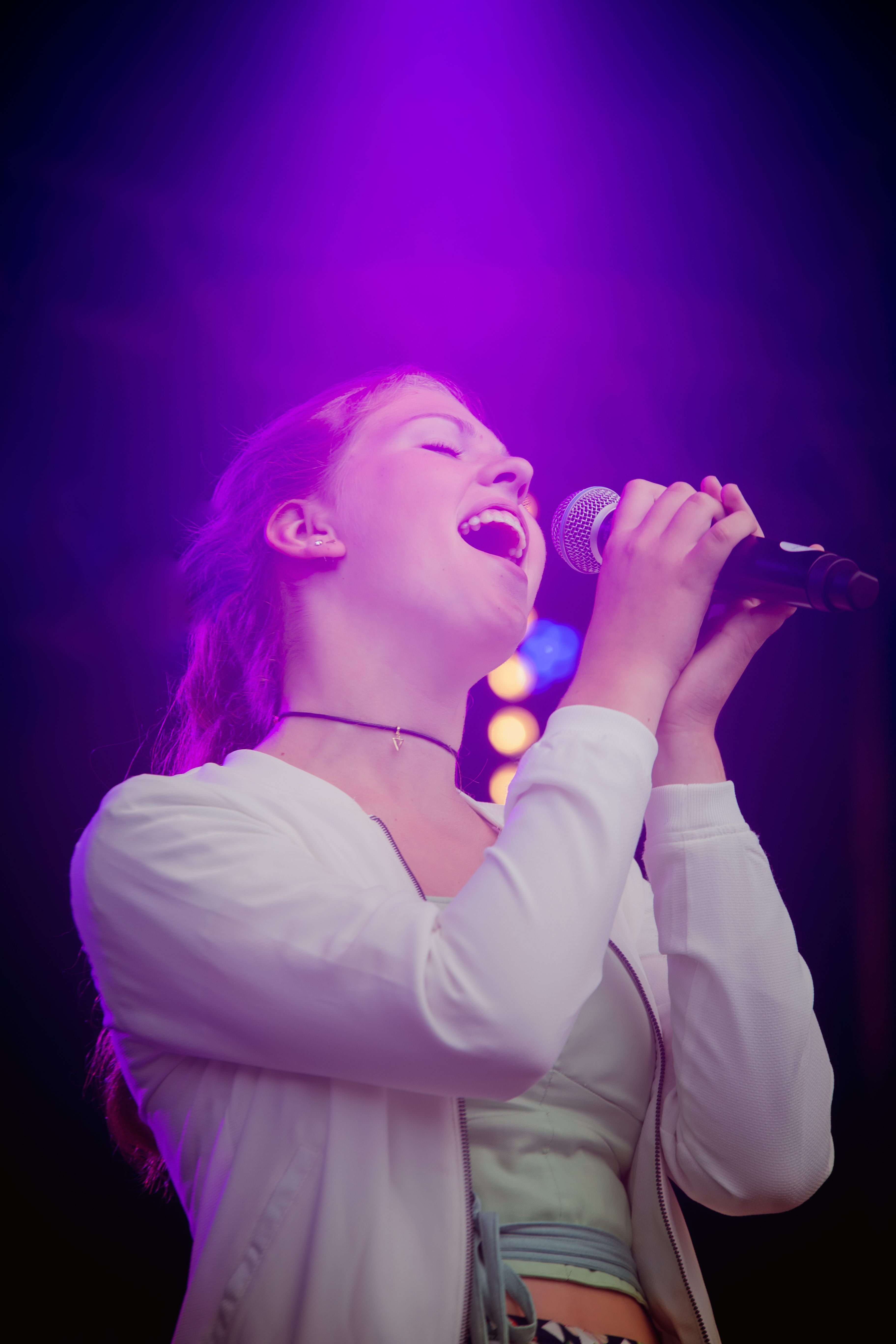 Iris Verhoek